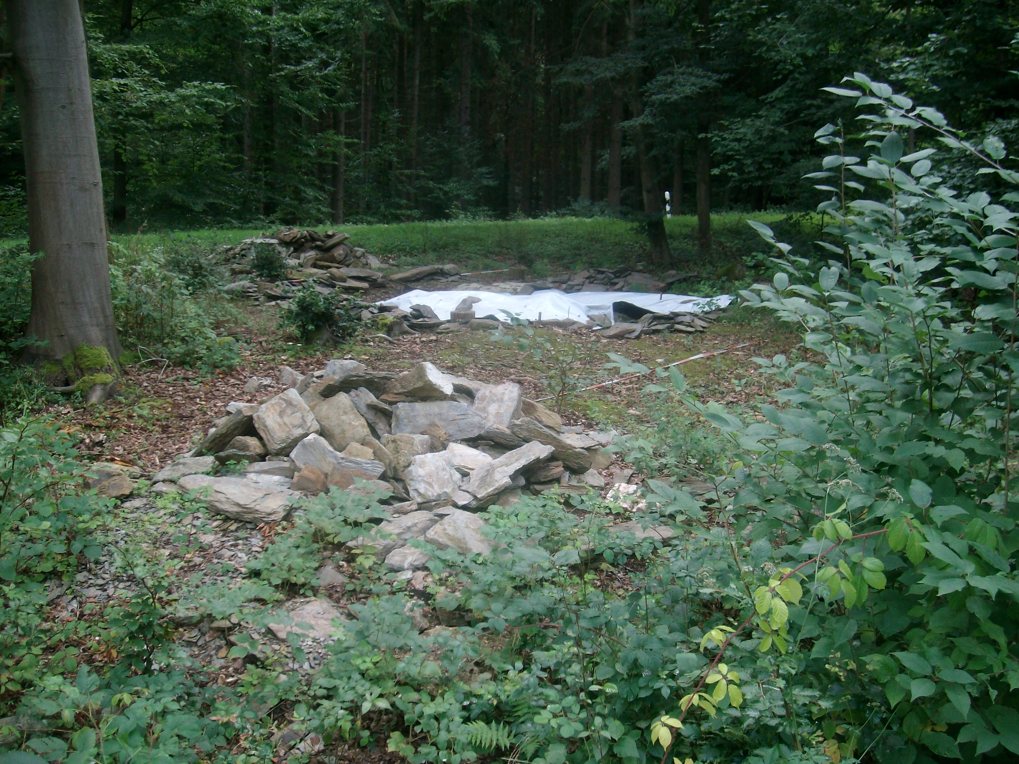 Wachposten 3/4 am Limes